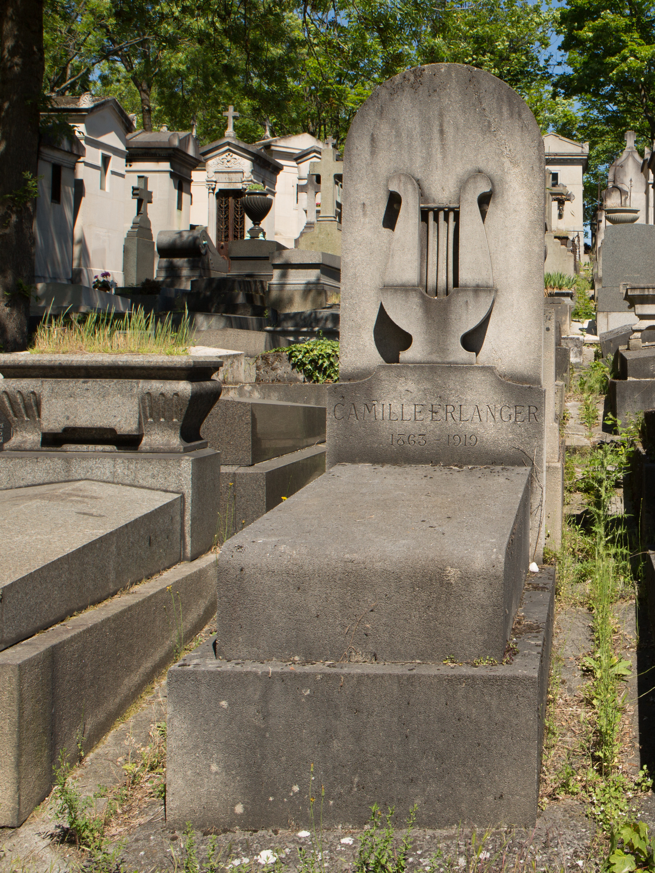 Sépulture de Camille Erlanger (1863-1919), compositeur.